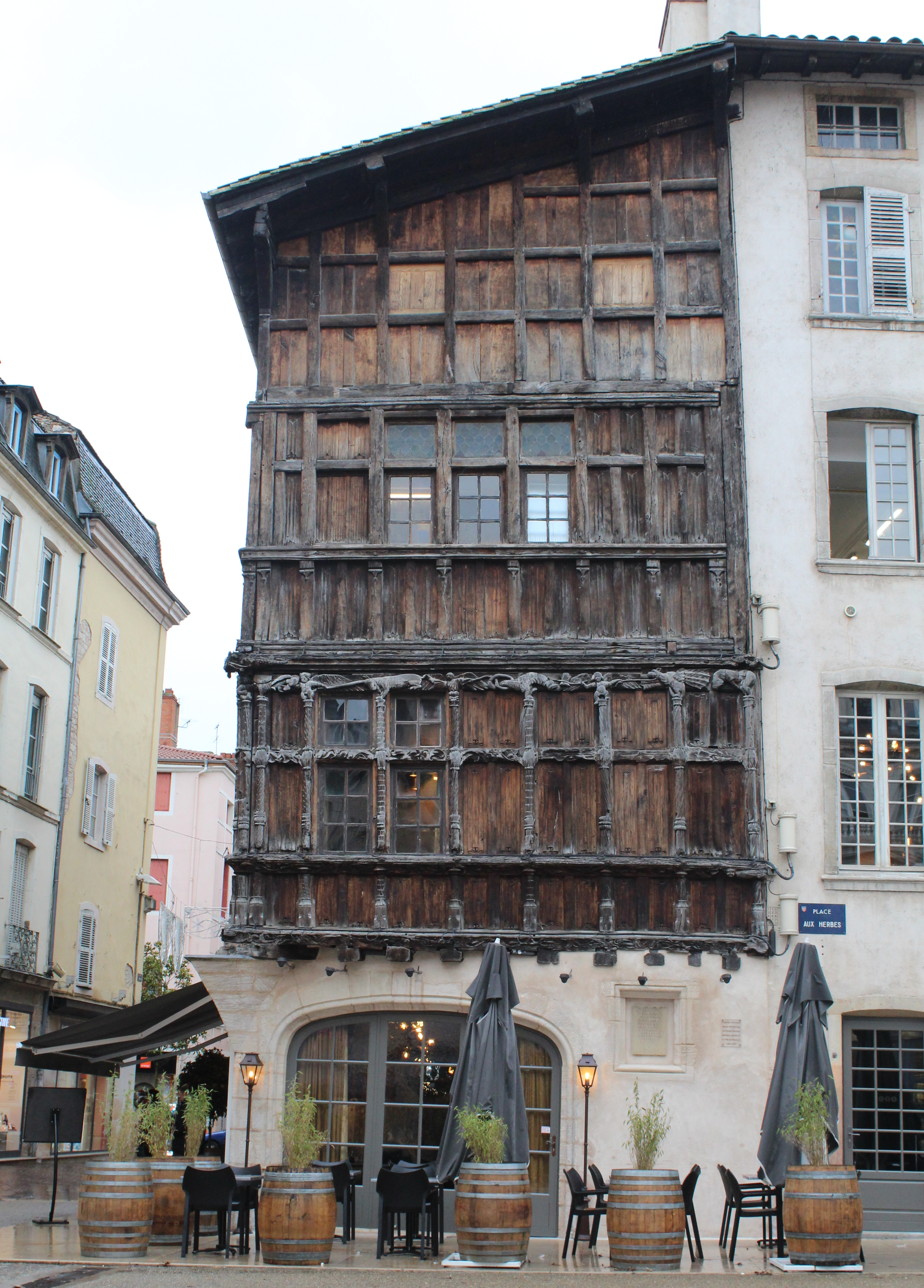 Maison de Bois, Mâcon.